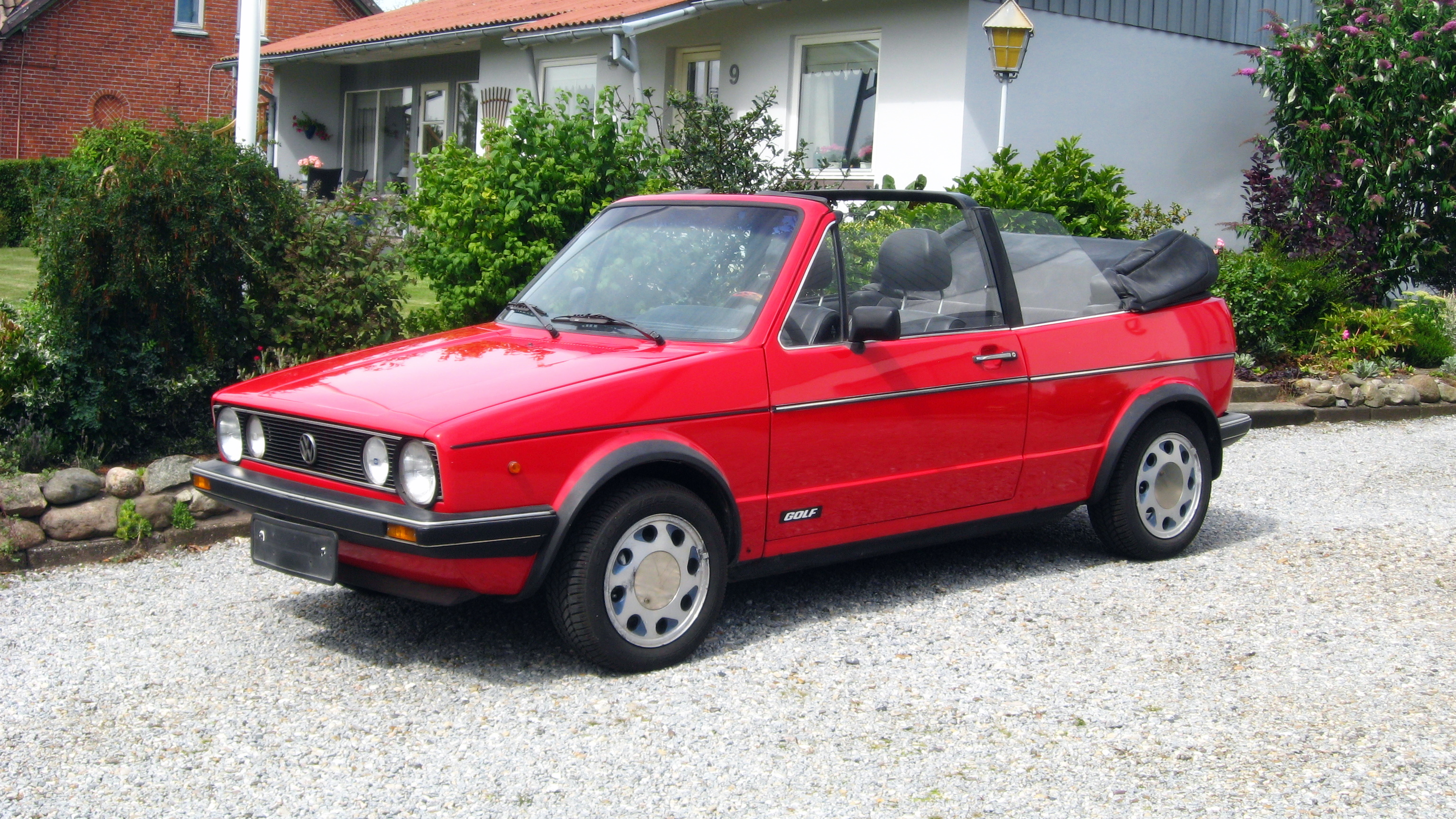 VW Golf I Cabriolet